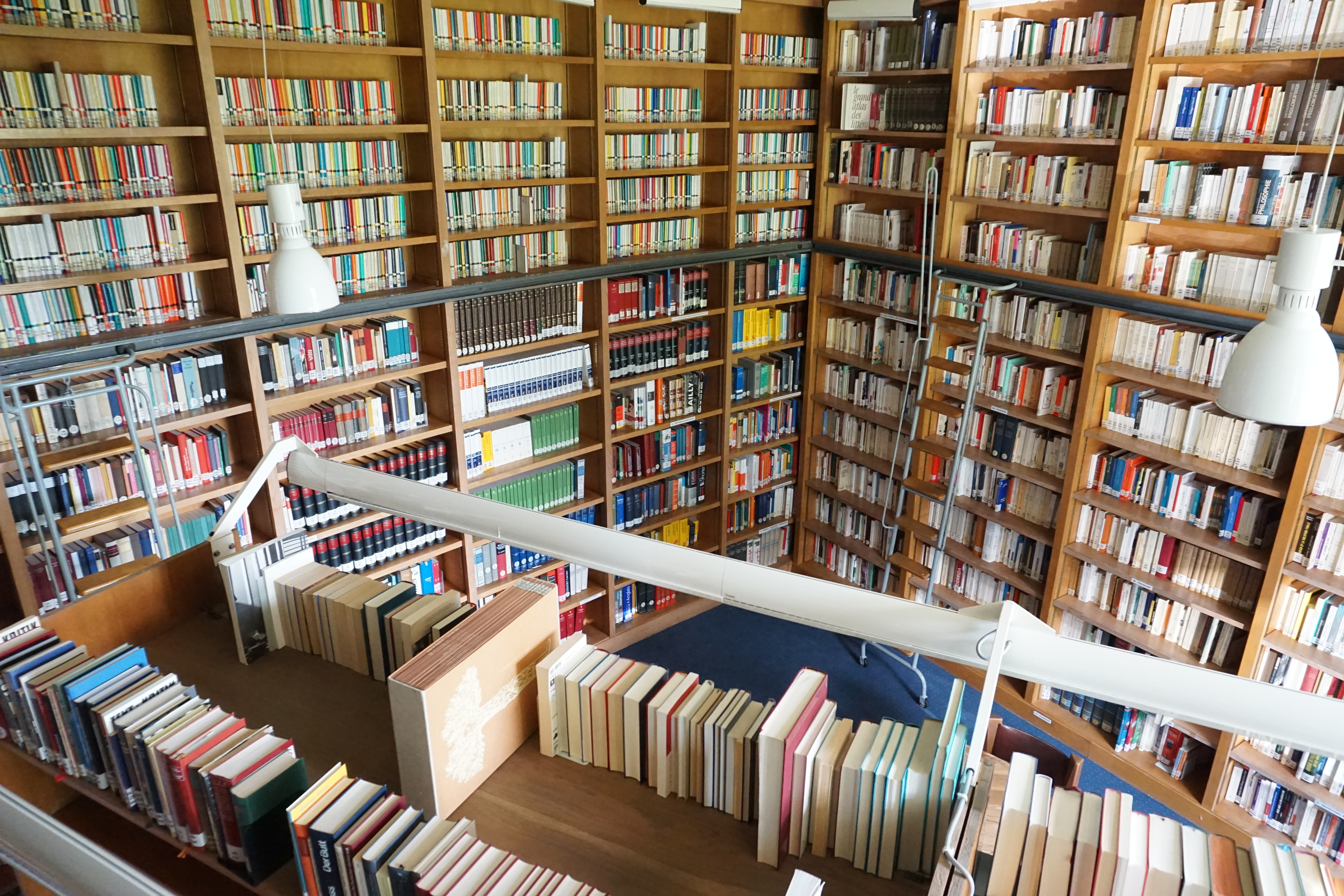 La bibliothèque da la Maison Heinrich Heine possède environ 20 000 titre en francais et allemand. A cela s'ajoutent 800 films en allemand et 600 CDs.